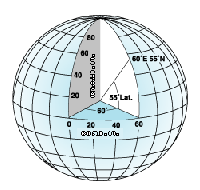 രേഖാംശം-അക്ഷാംശം